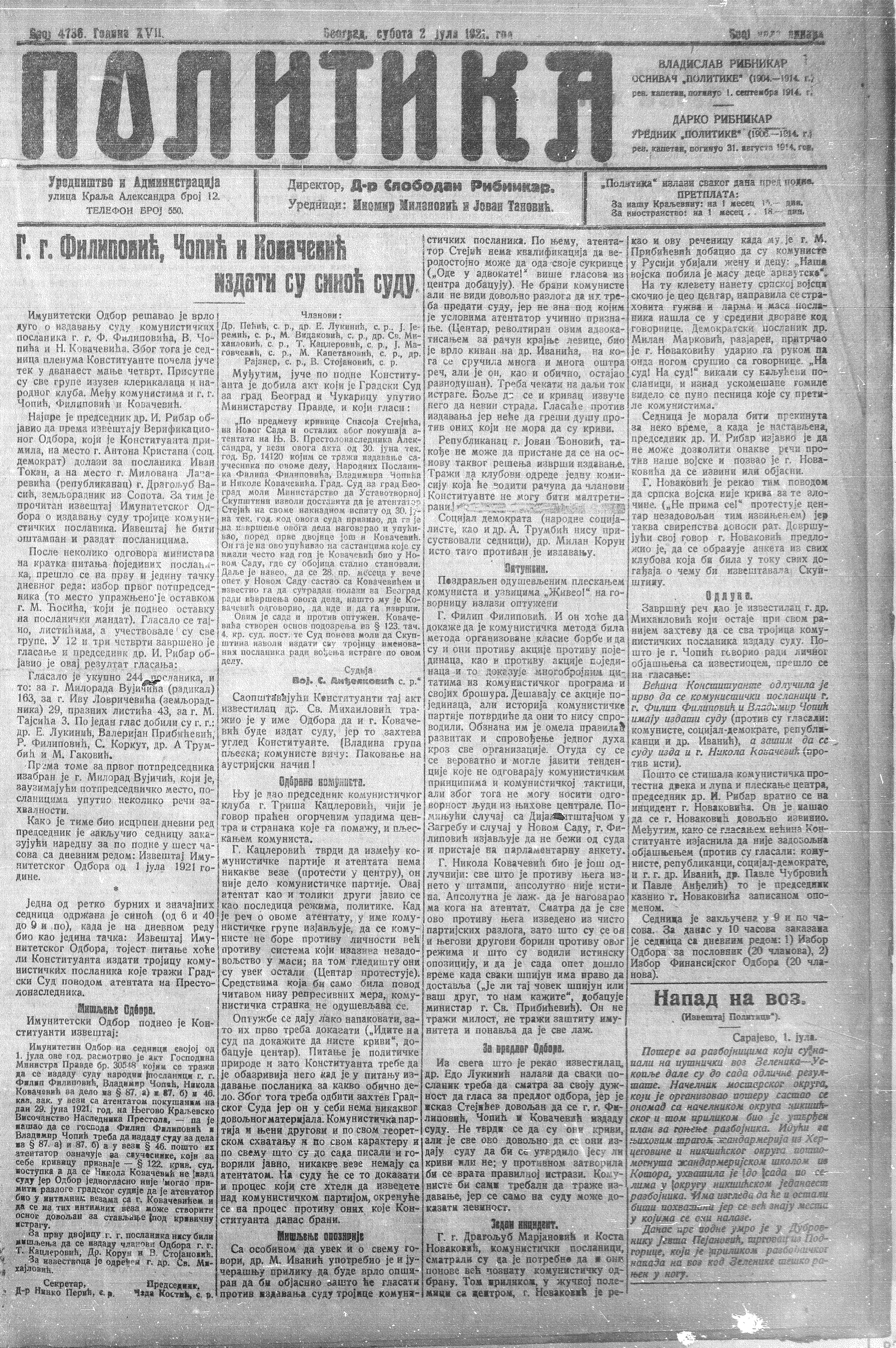 Srpskohrvatski / српскохрватски: Naslovnica Politika od 02. 07. 1921. o hapšenju komunističkih poslanika nakon neuspelog atentata na regenta Aleksandra.